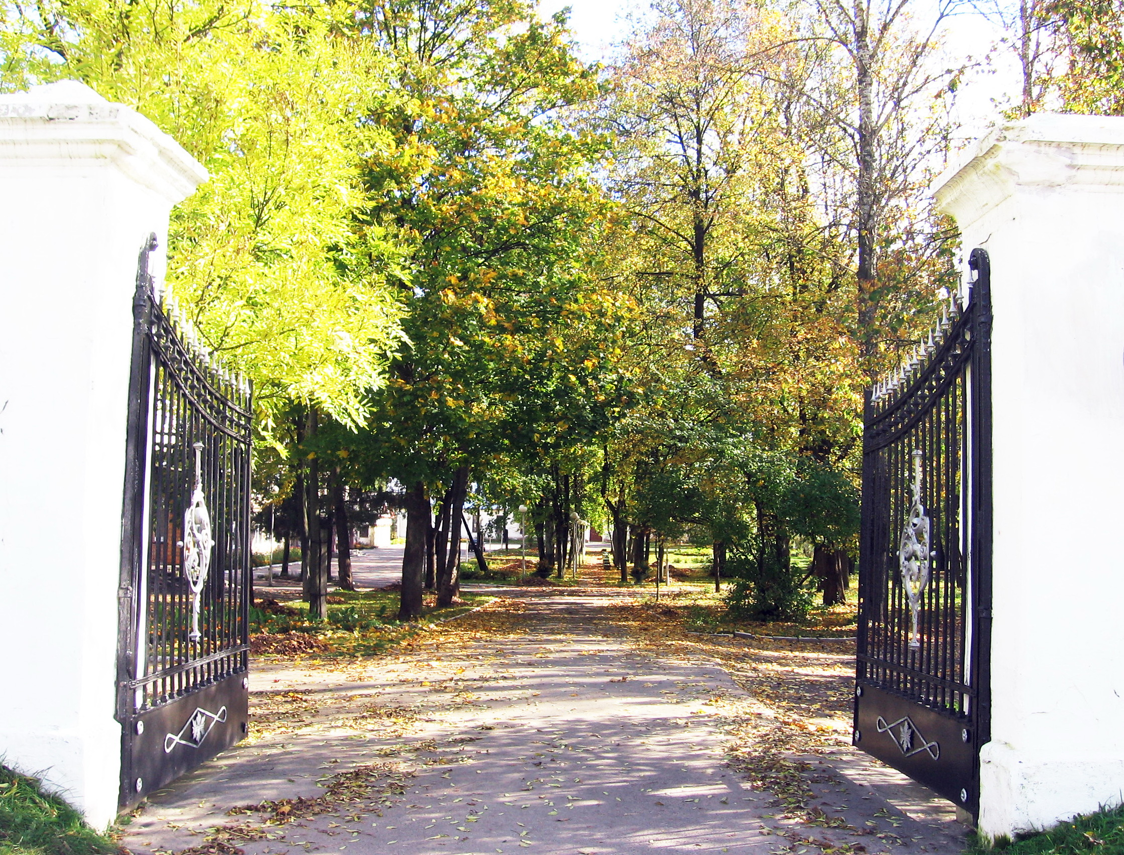 Беларуская (тарашкевіца): Фрагмэнты палацава-паркавага ансамблю:палацдва флігеліслужбовы корпусэлемэнты абарончых збудаваньняў (водная сістэма, земляныя валы, рэшткі ўязной брамы)паркбылая аранжарэя. г. Высокае This is a photo of Belarusian heritage monument. Reference number: 112Г000337 ( WLM)